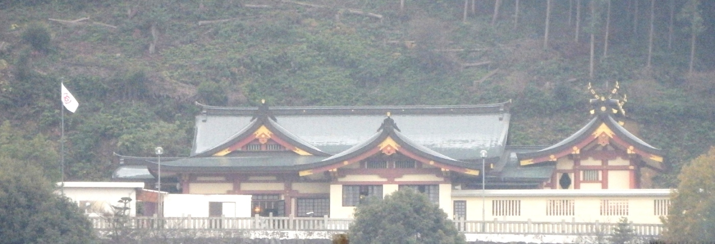 石鎚神社の本殿